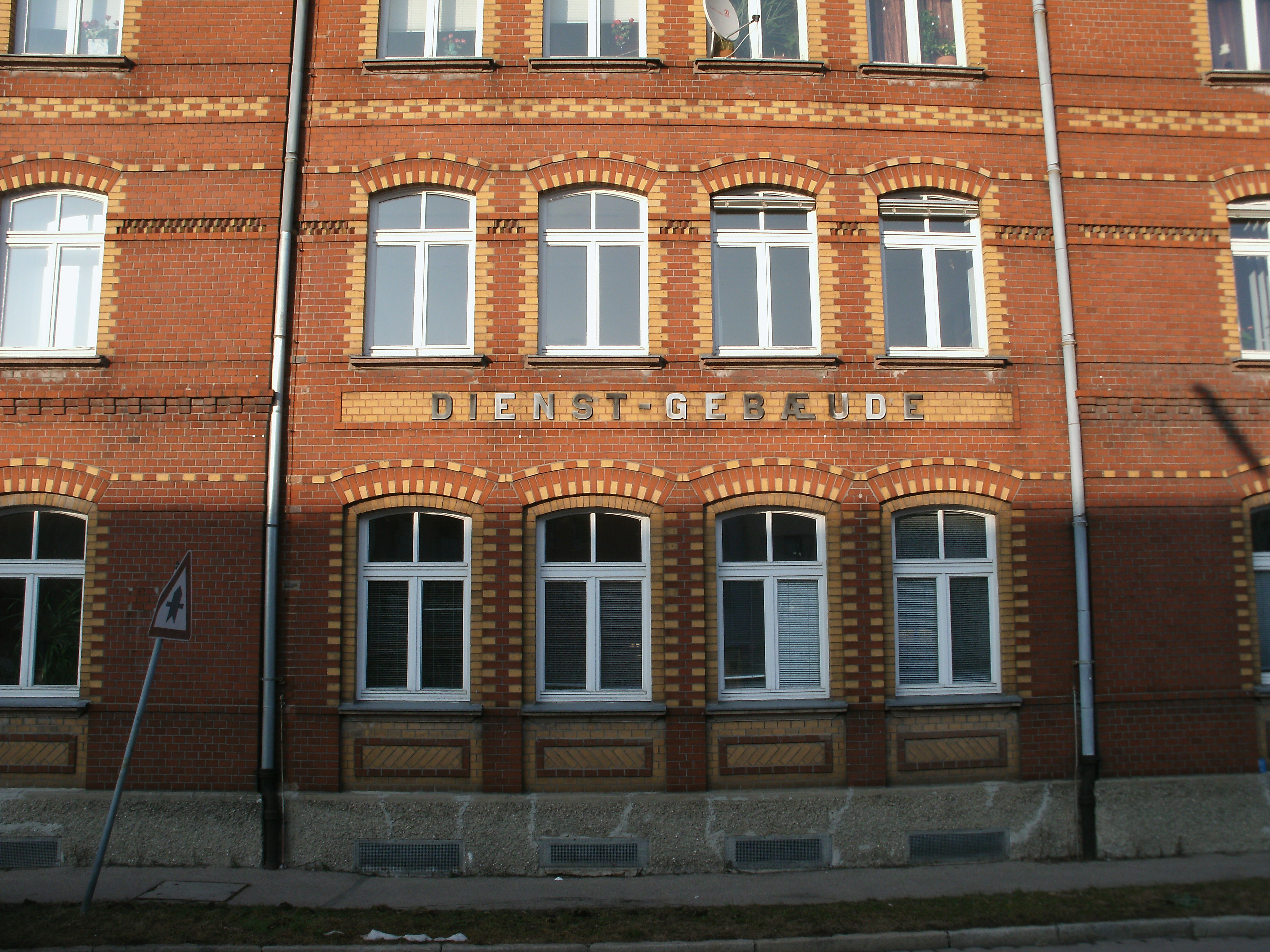 Augsburg, Proviantbachstraße 1, Ehem. Städtischer Schlacht- und Viehhof, Dienstgebäude